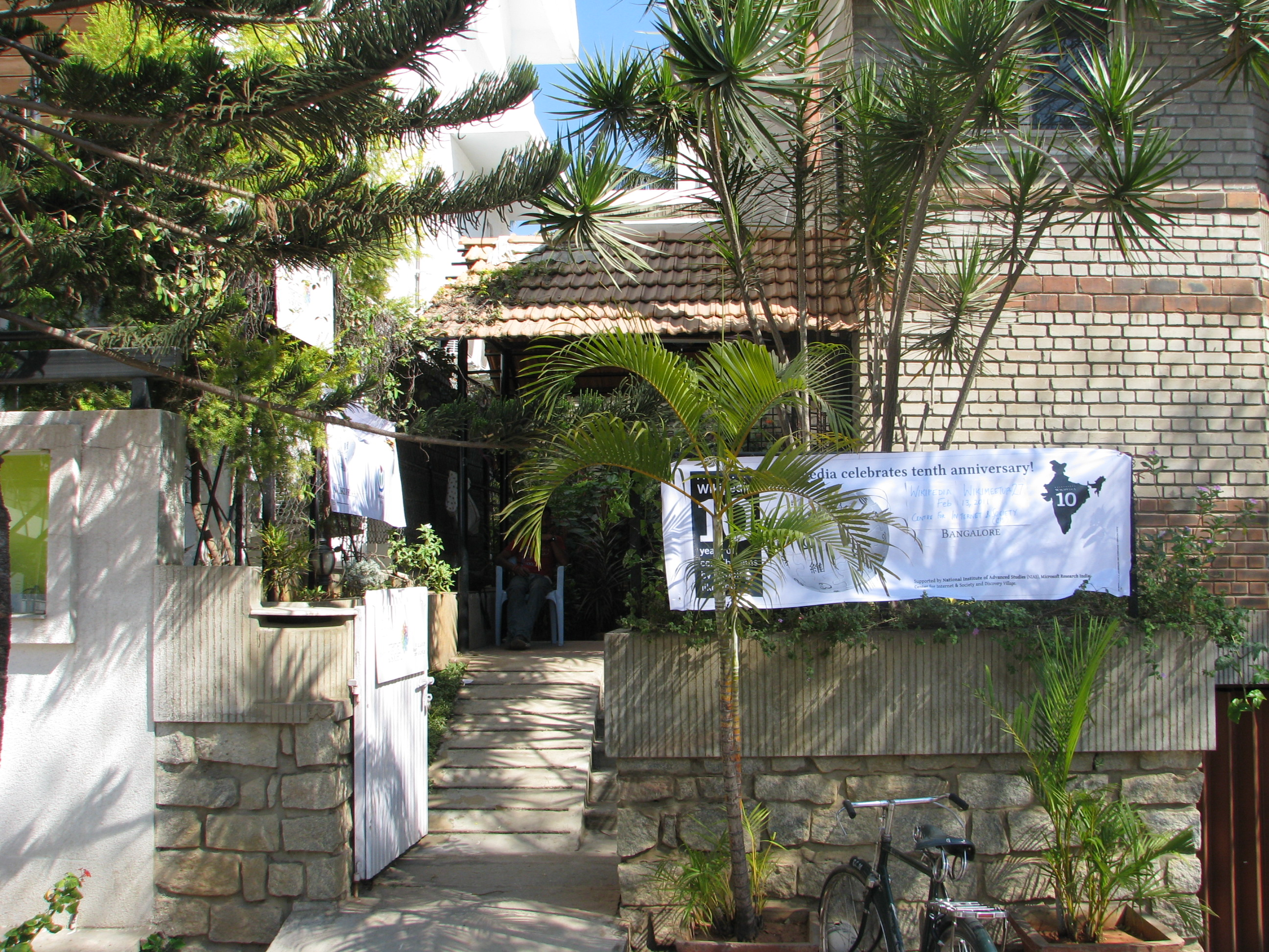 Bangalore Wikimeetup27 photos